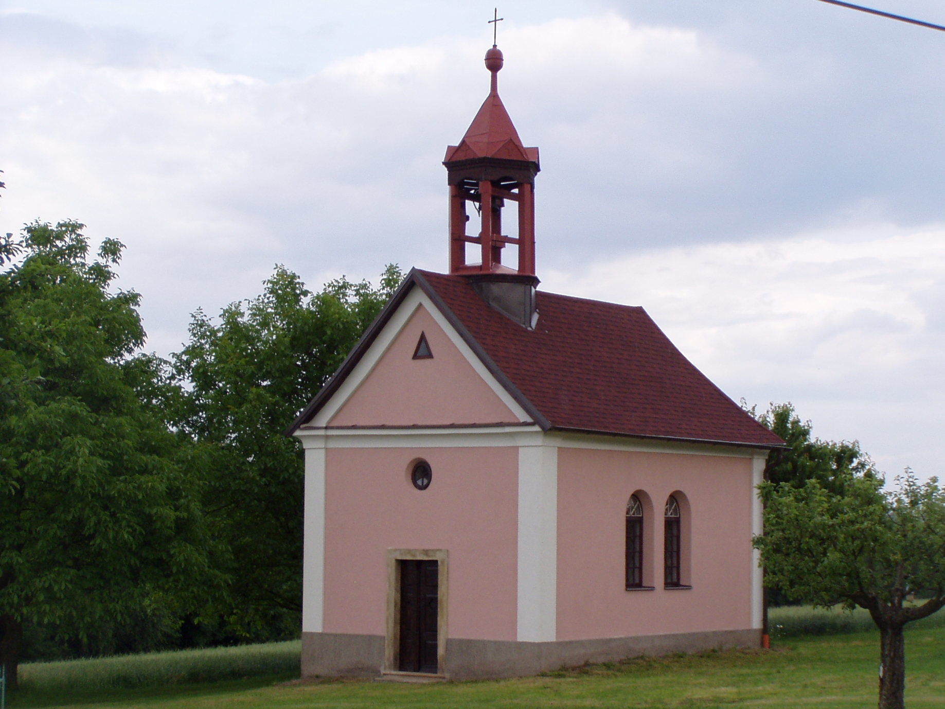 Kaple sv. Antonína Paduánského v Olešnici u Č. Kostelce